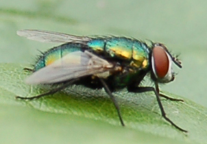 Mouche verte - Green fly